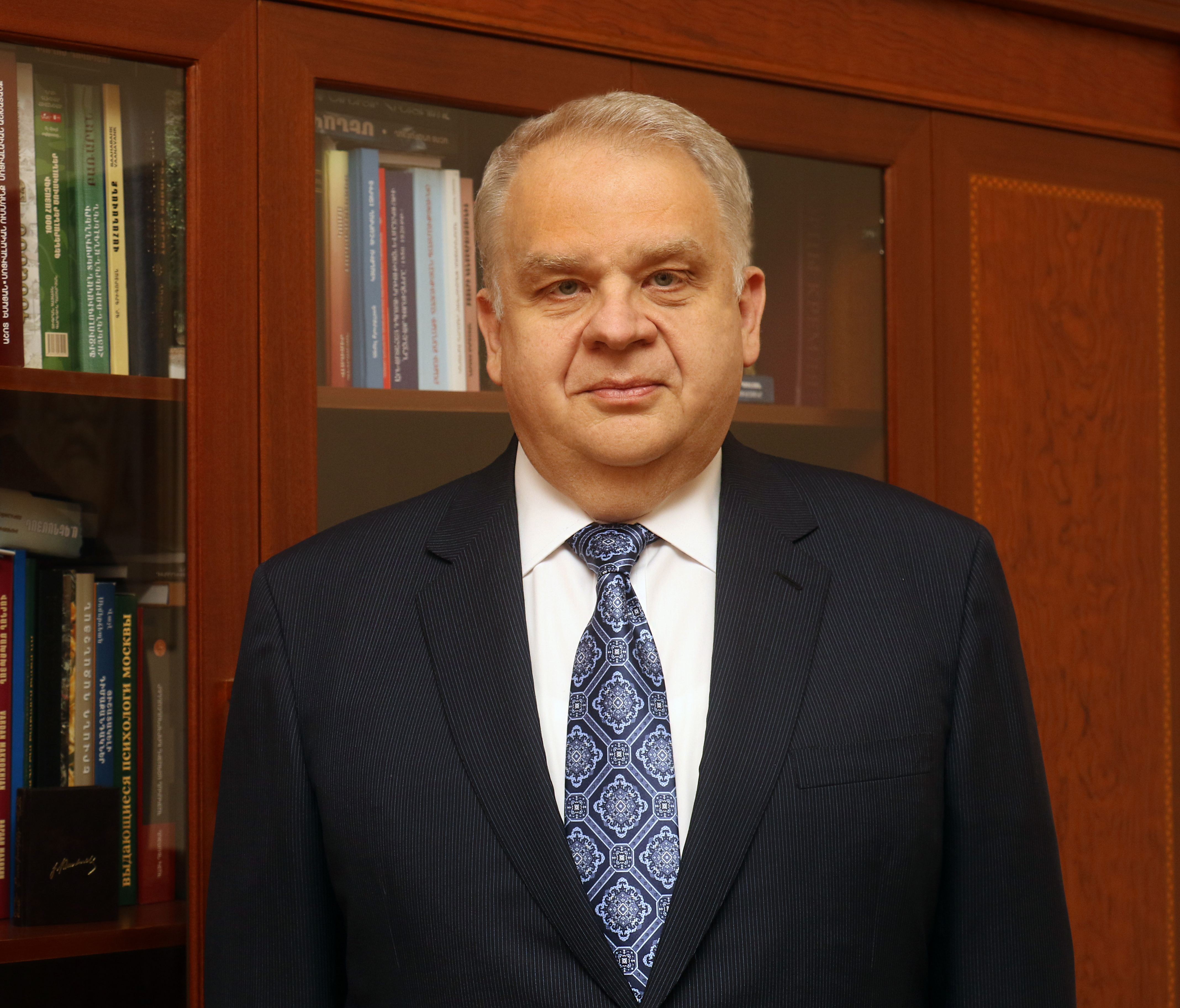 ՀՊՄՀ Ռեկտոր